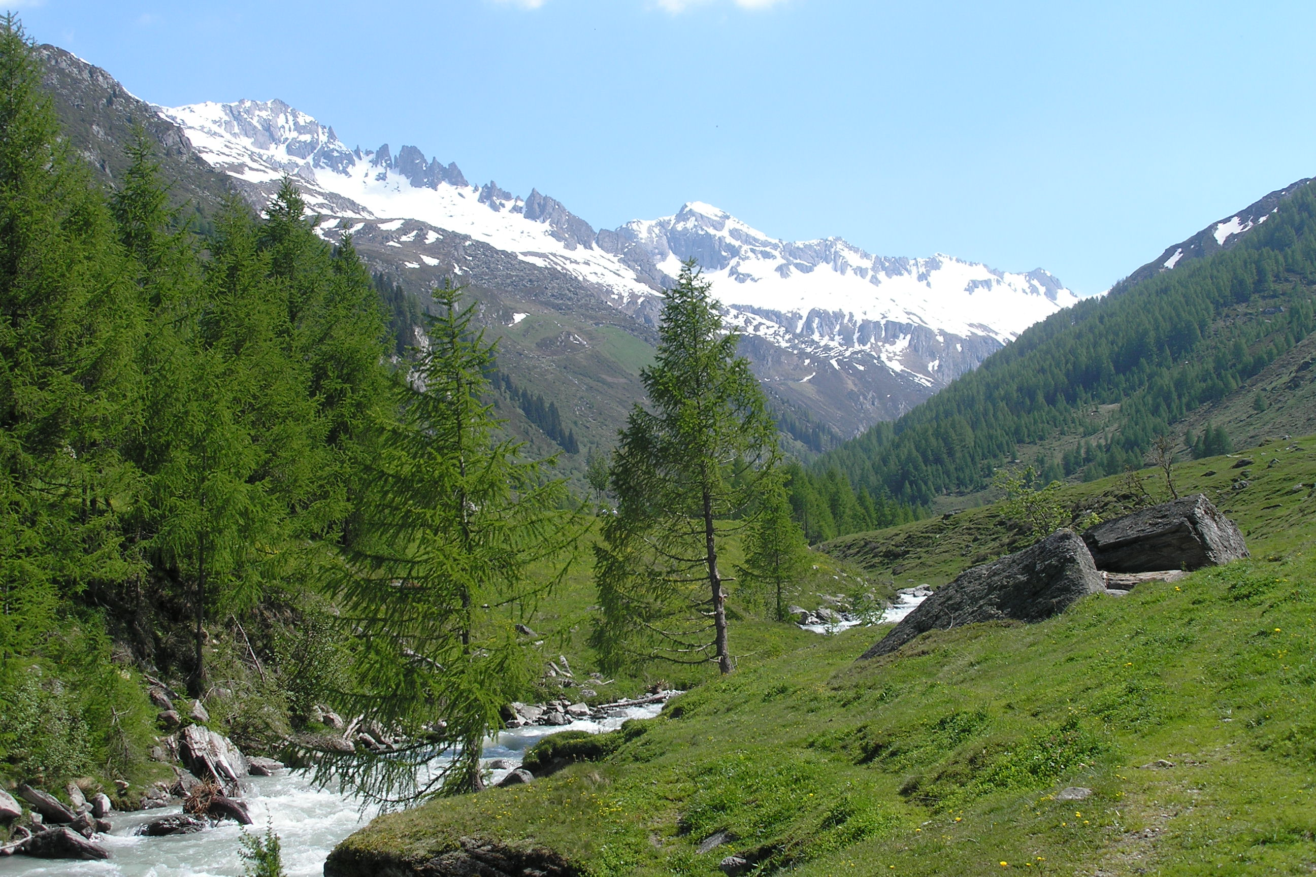 Ahrntal, oberhalb von Kasern